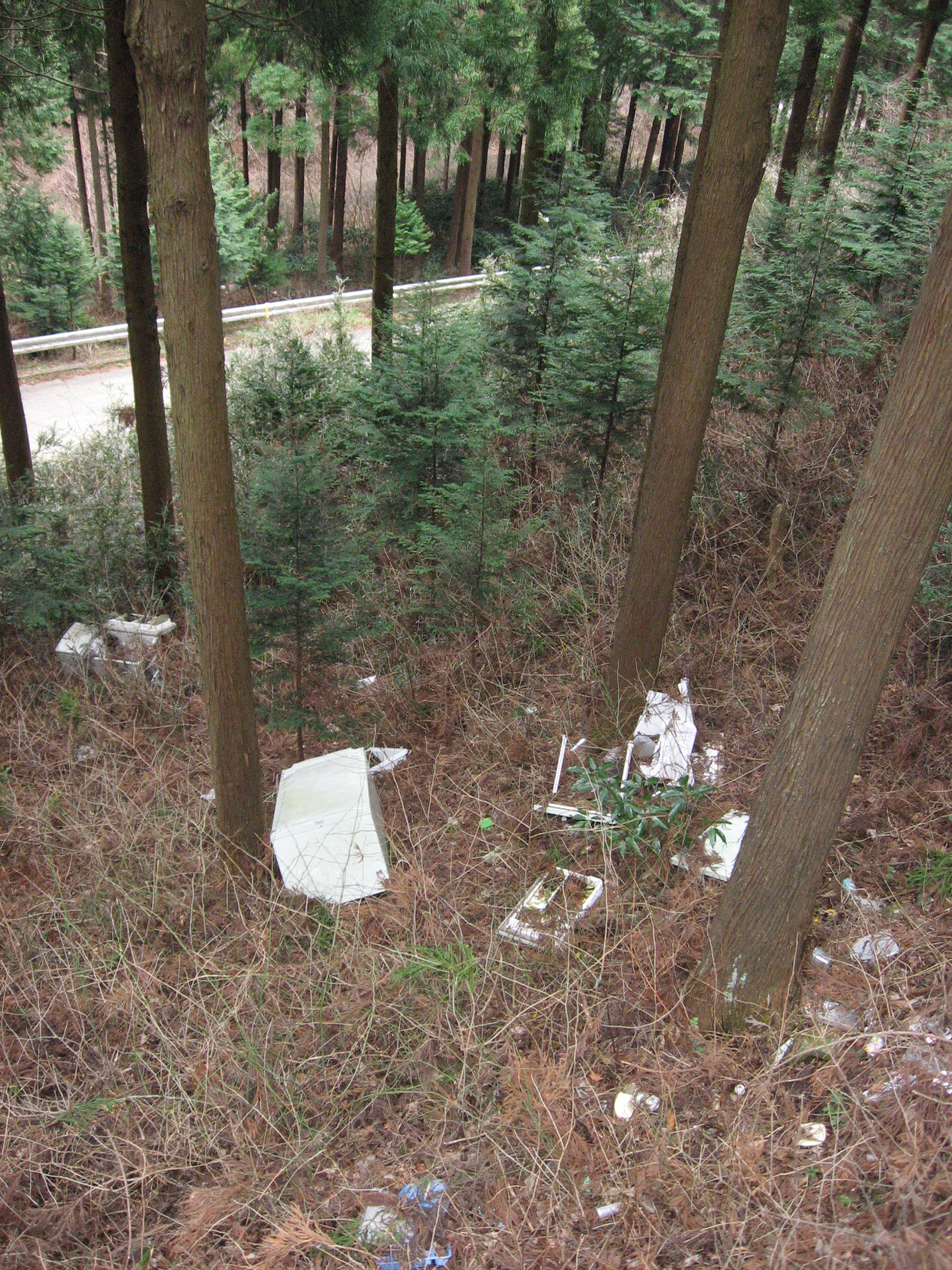 南山林道（丹沢山地の林道）の不法投棄。首都圏の林道などでは現在問題となっている。